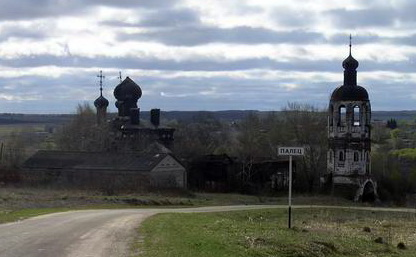 Церковь Страстной иконы Божией Матери - Одигитриевская церковь. 1680 год. Село Палец